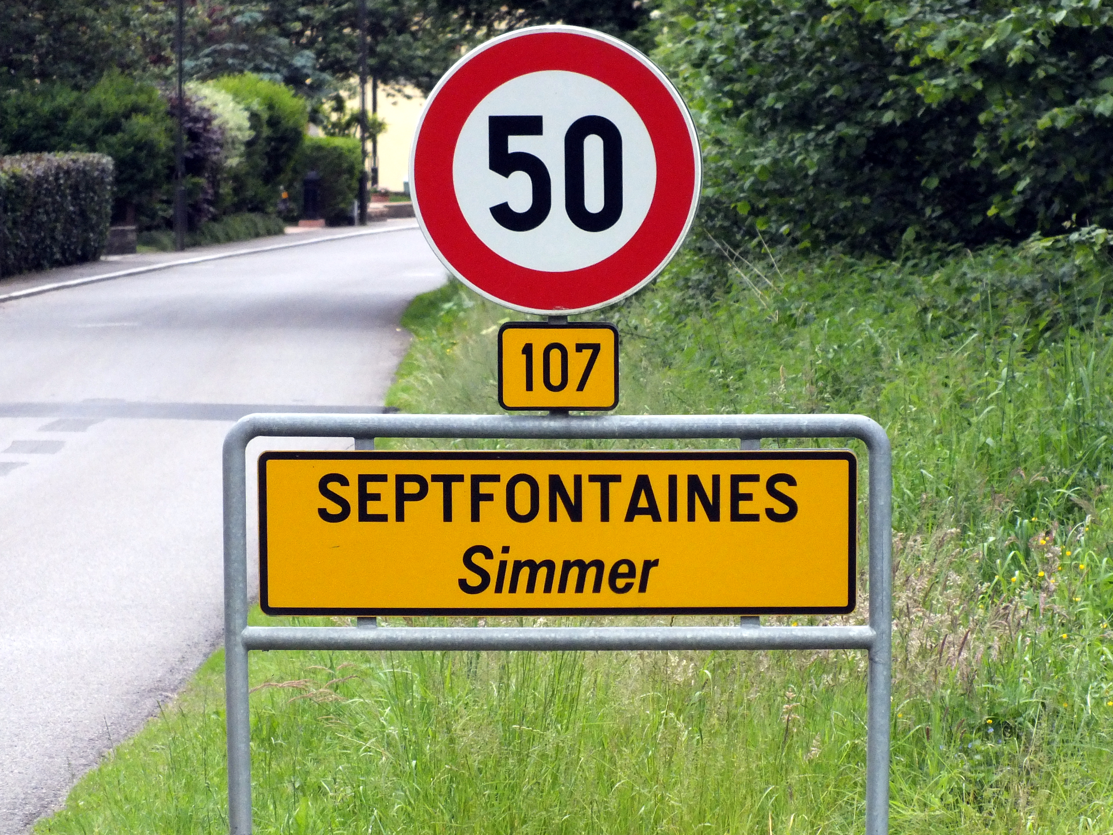 CR107, Simmer.